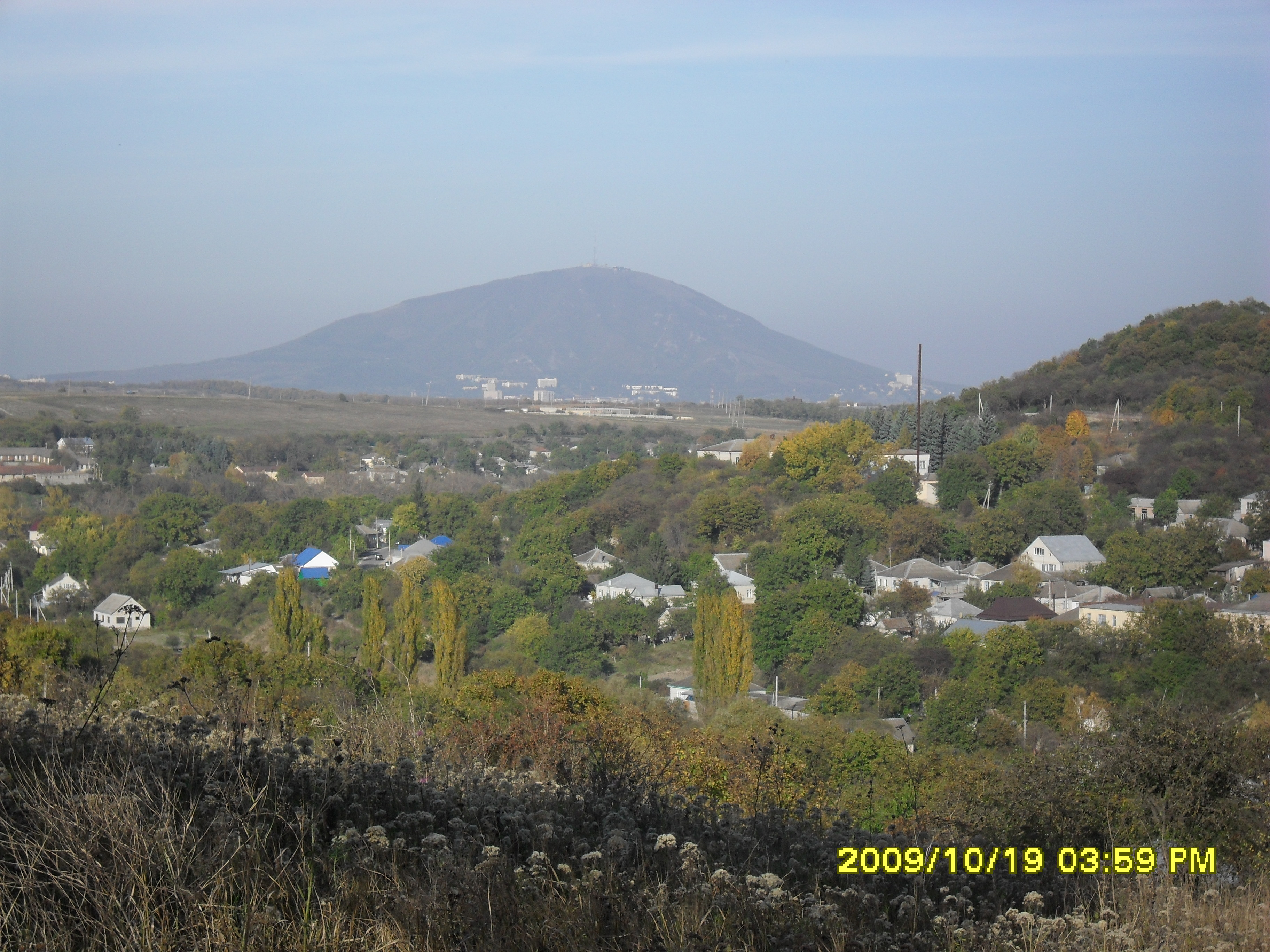 Посёлок Юца